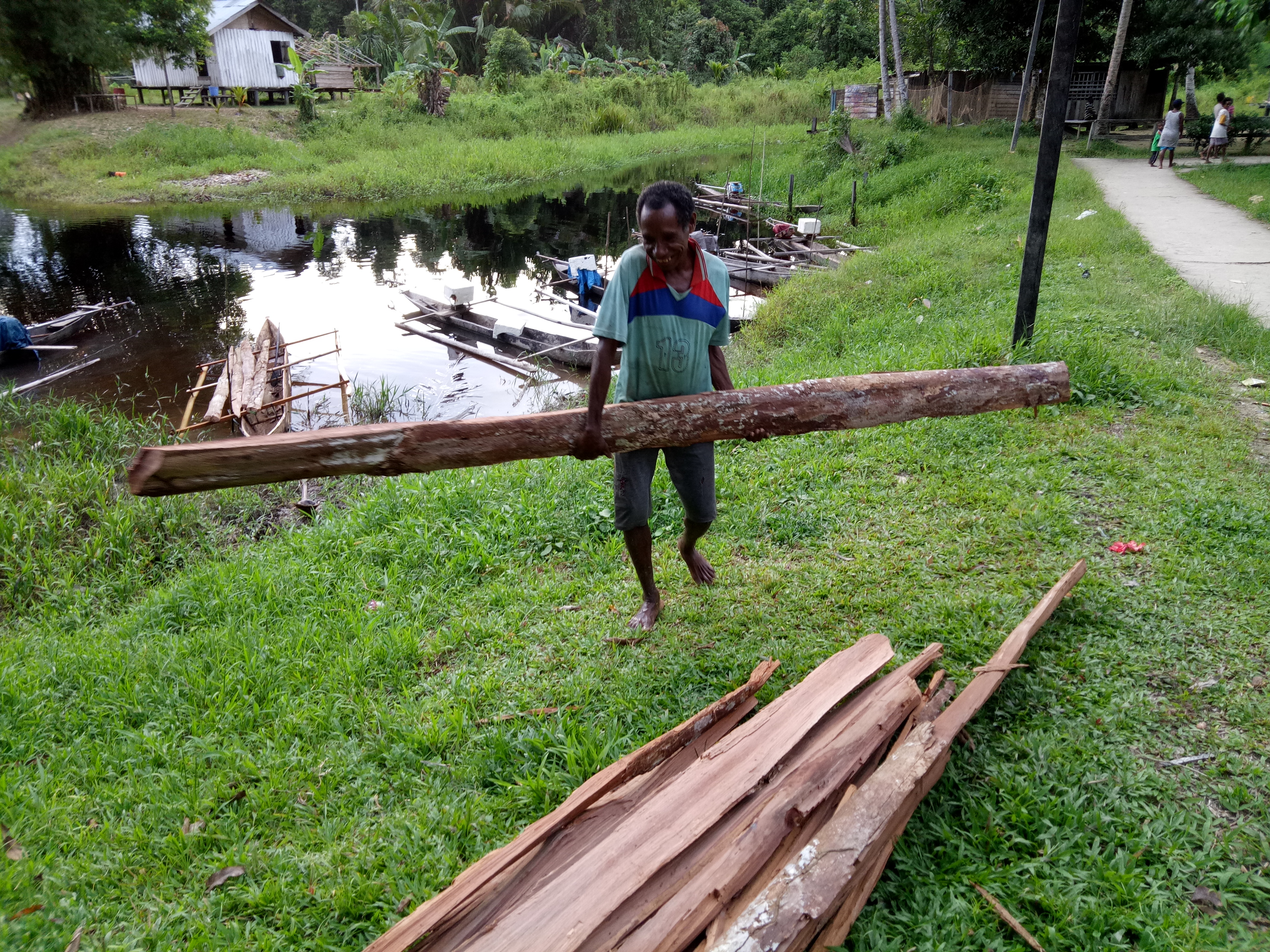 kampung benawa 1. papua barat